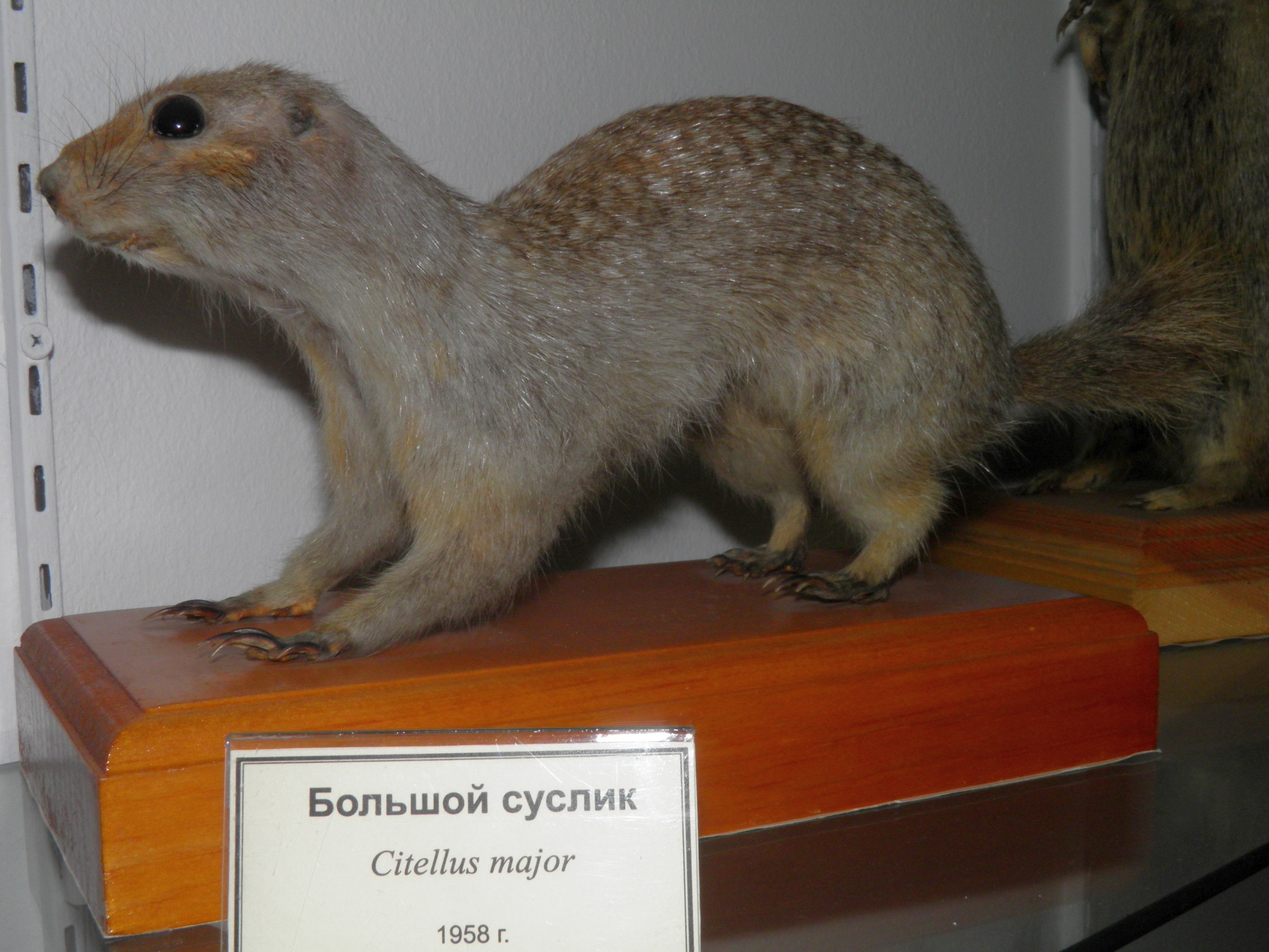 Большой суслик (Spermophilus major)